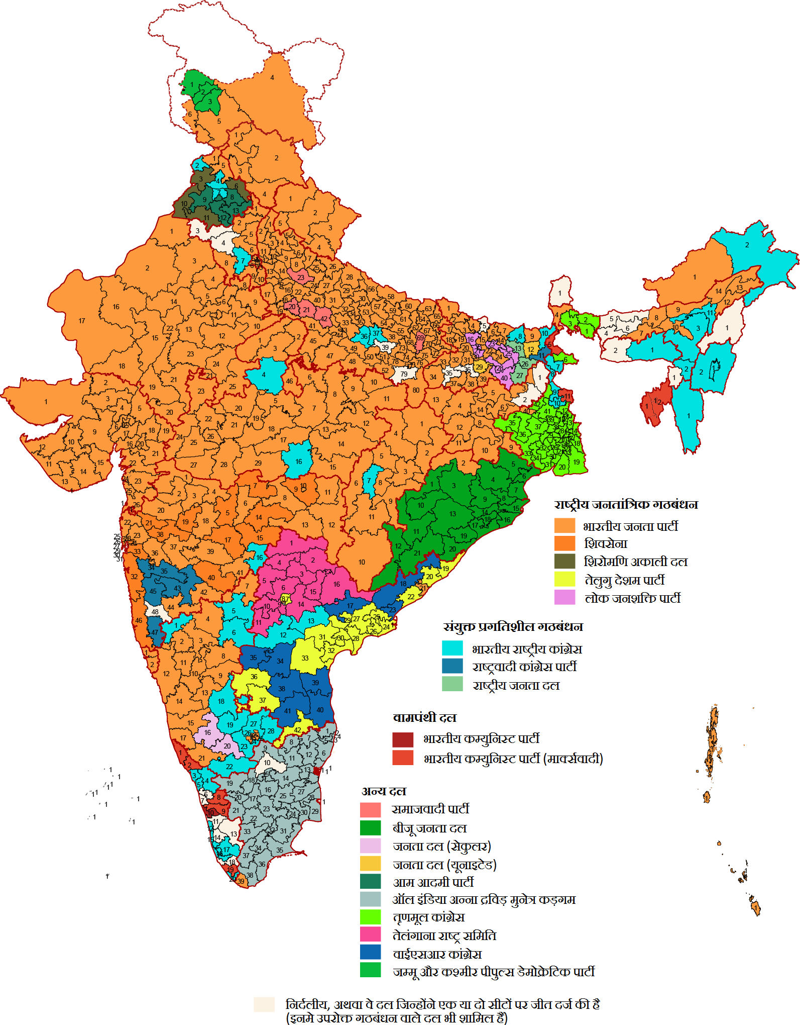 hi:भारतीय आम चुनाव, 2014 के दौरान क्षेत्रवार चुने गए सांसद